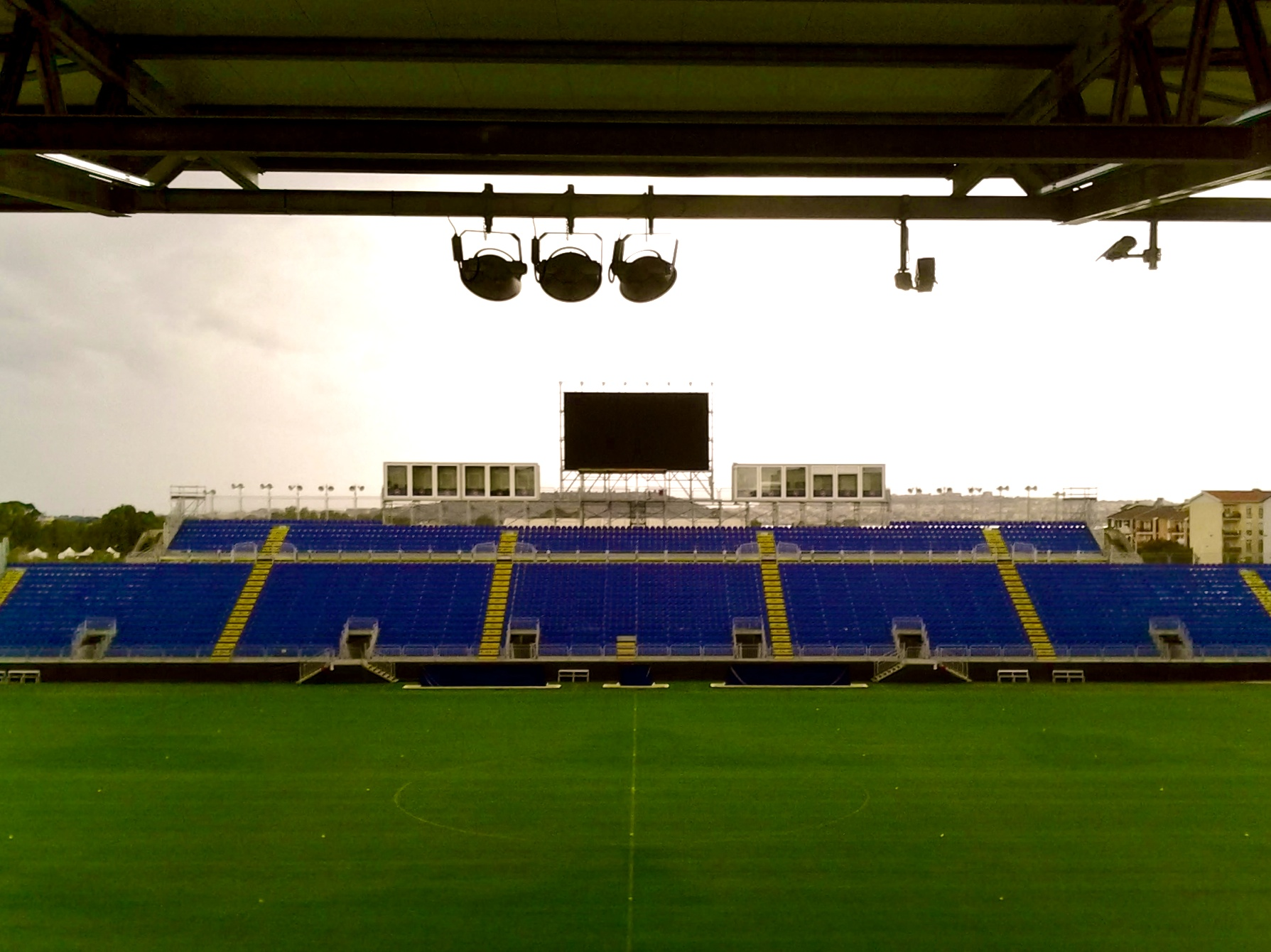 La Tribuna Distinti dello stadio "Is Arenas" di Quartu S.Elena (CA) vista dalla "Main Stand".